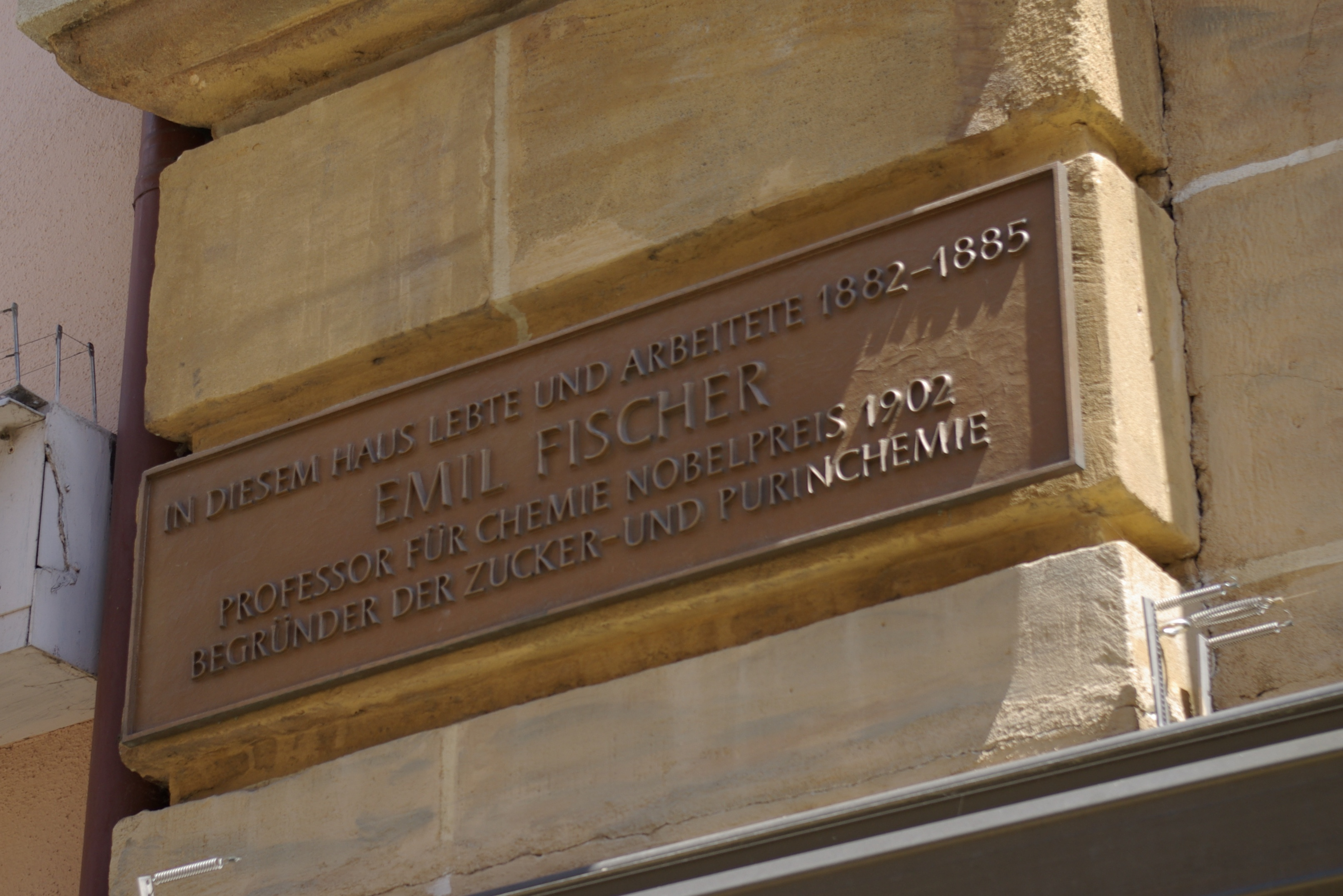 Gedenktafel für Emil Fischer in Erlangen (Haupstraße 26)